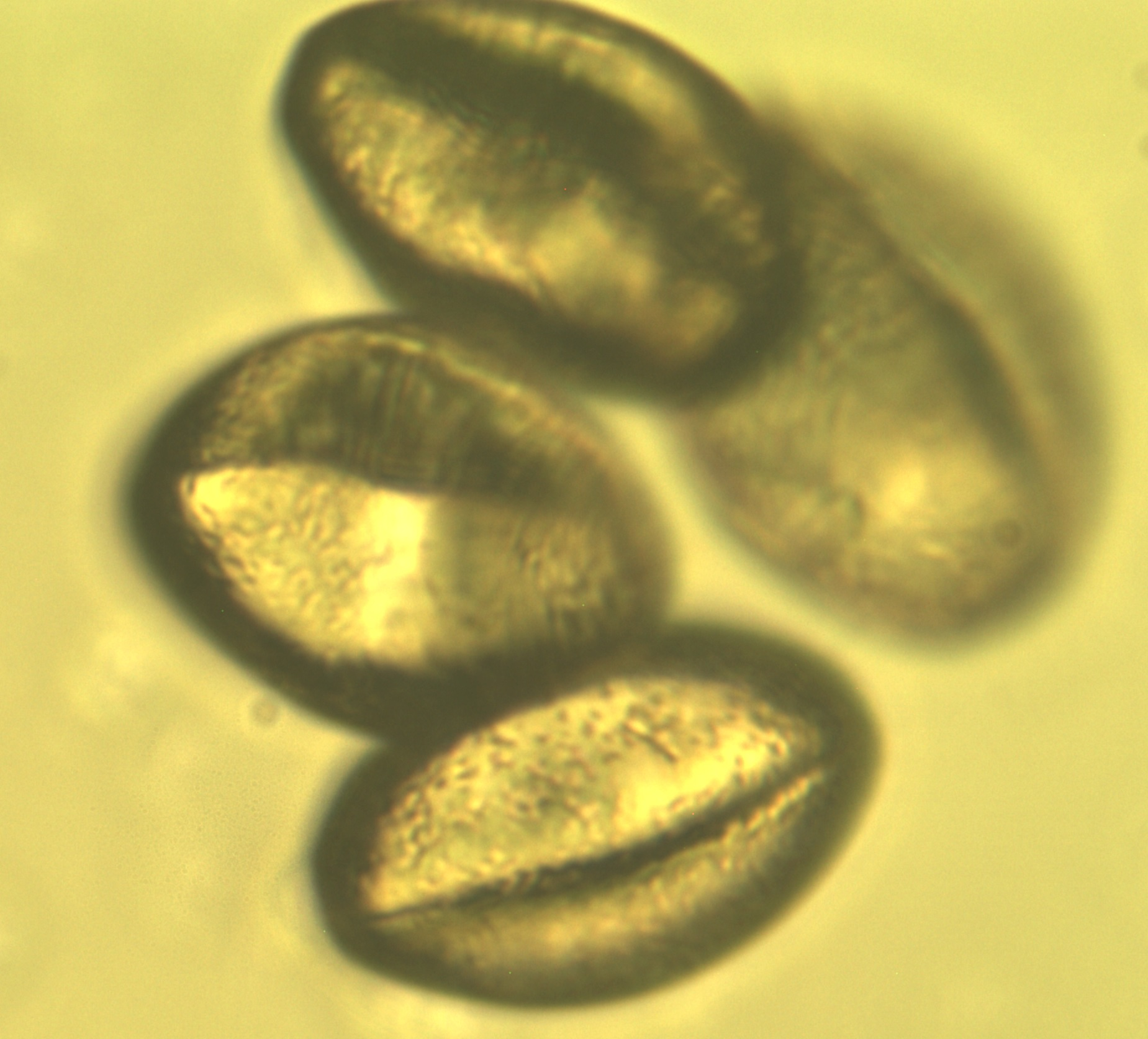 Lamium album Pollen 400x